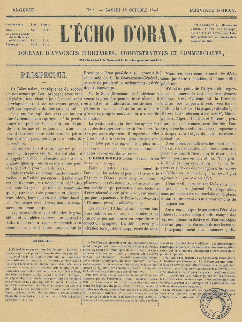 Echo d'Oran No 1 - 12-10-1844